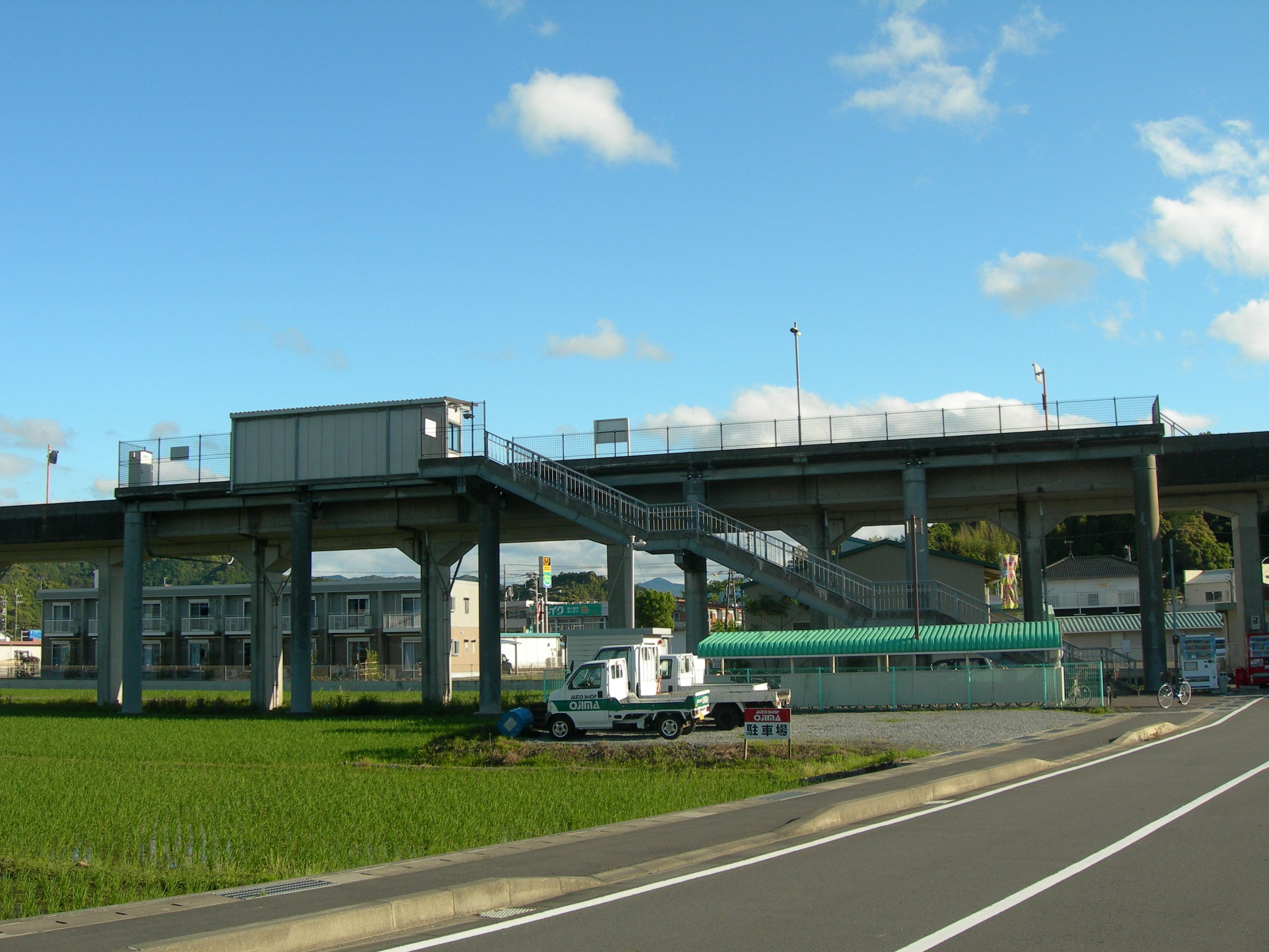 具同駅